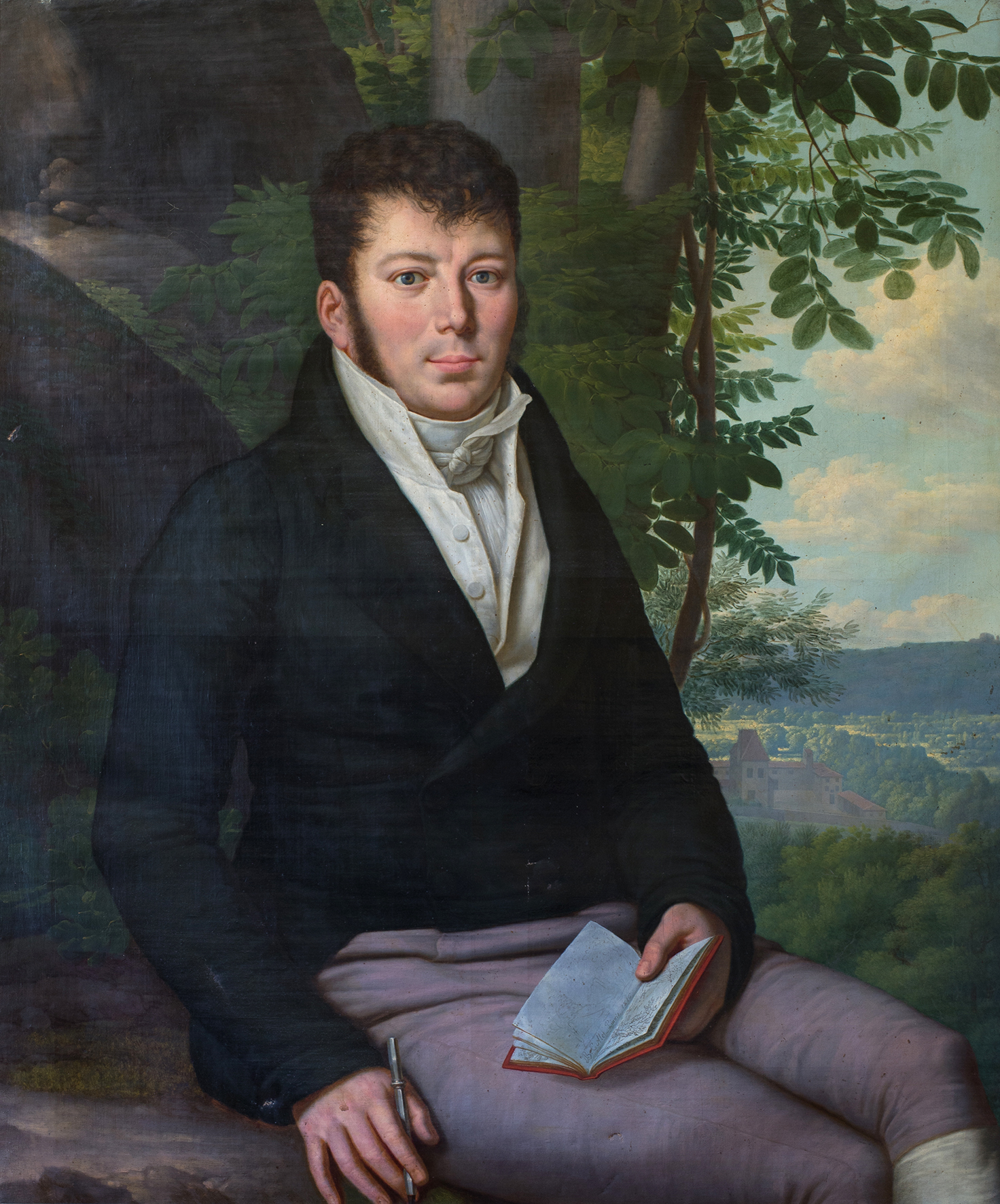 Peinture XIXe siècle